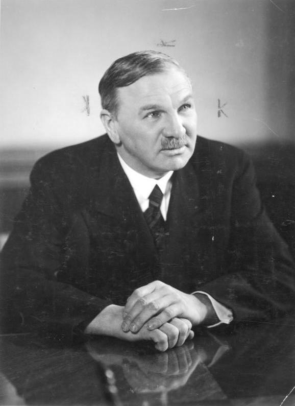 Dr. h. c. Heinrich Koppenberg 60 Jahre Am 15. März d. J. begeht eine der markantesten Persönlichkeiten der deutschen Wirtschaft, Dr. h. c. Heinrich Koppenberg, Wehrwirtschaftsführer und Generaldirektor der Junkers Flugzeug- und Motorenwerke AG. seinen 60. Geburtstag.